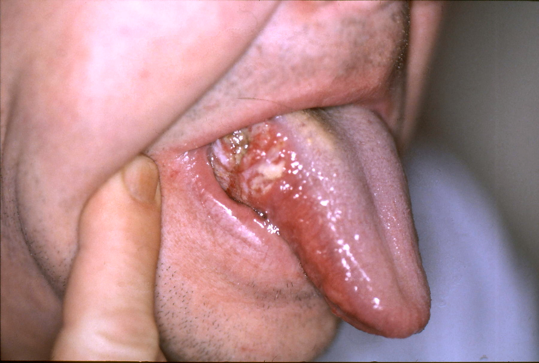 Zungencarcinom